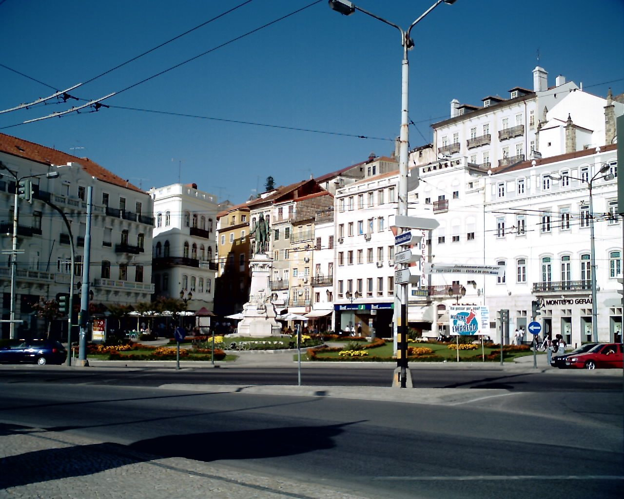 Portagem de çektiğim bir resim